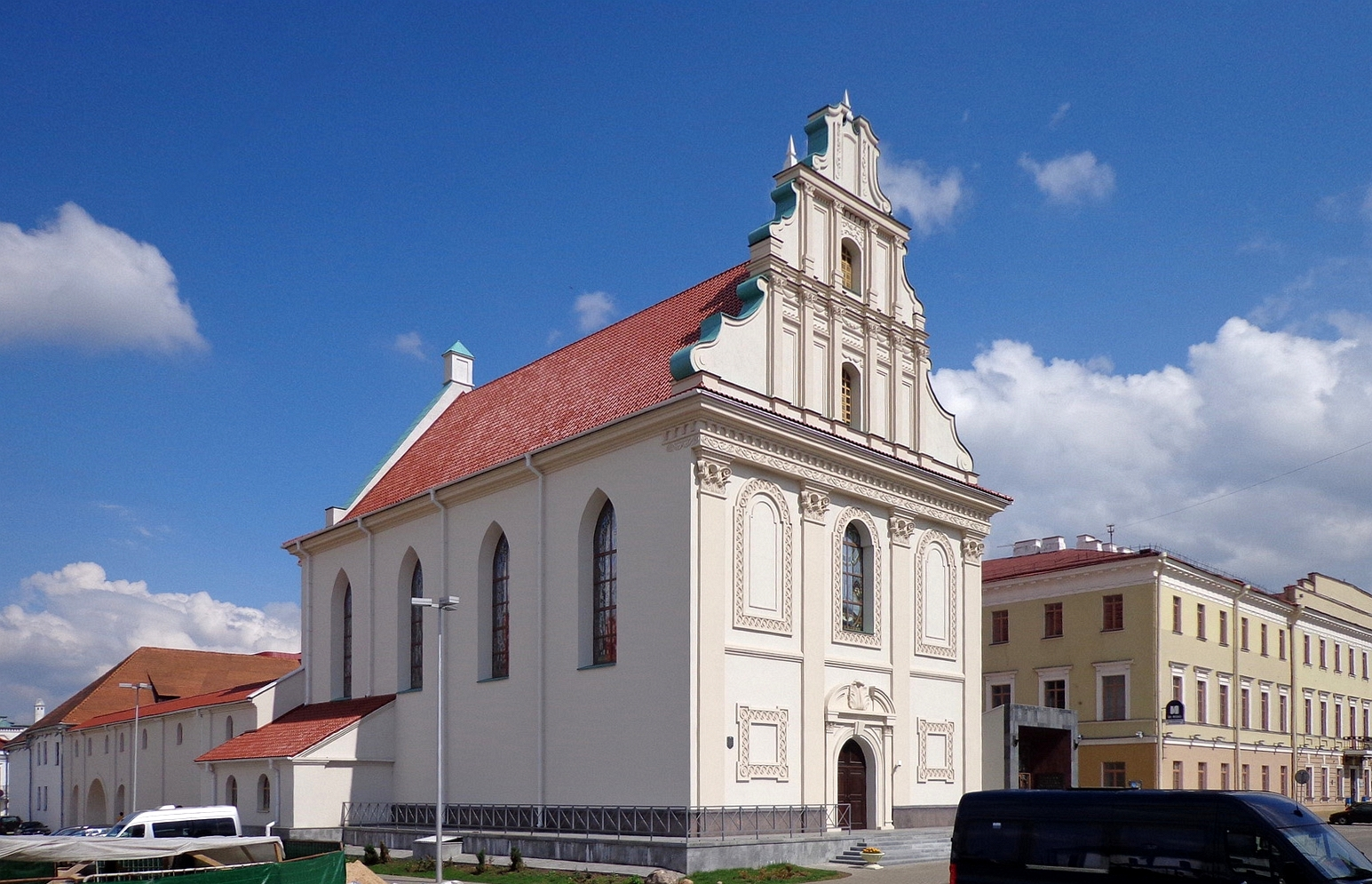 МИНСК. Бывшая греко-католическая церковь Св.Духа базилианского монастыря (восстановлена). Ныне музыкальная школа.